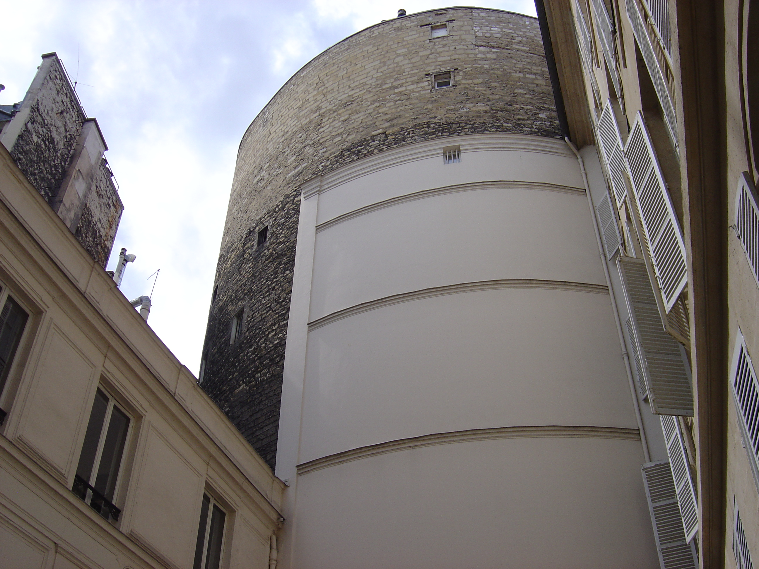 Vestiges de l'église conventuelle des Feuillants dans la cour du 229 de la rue Saint-Honoré, à Paris.